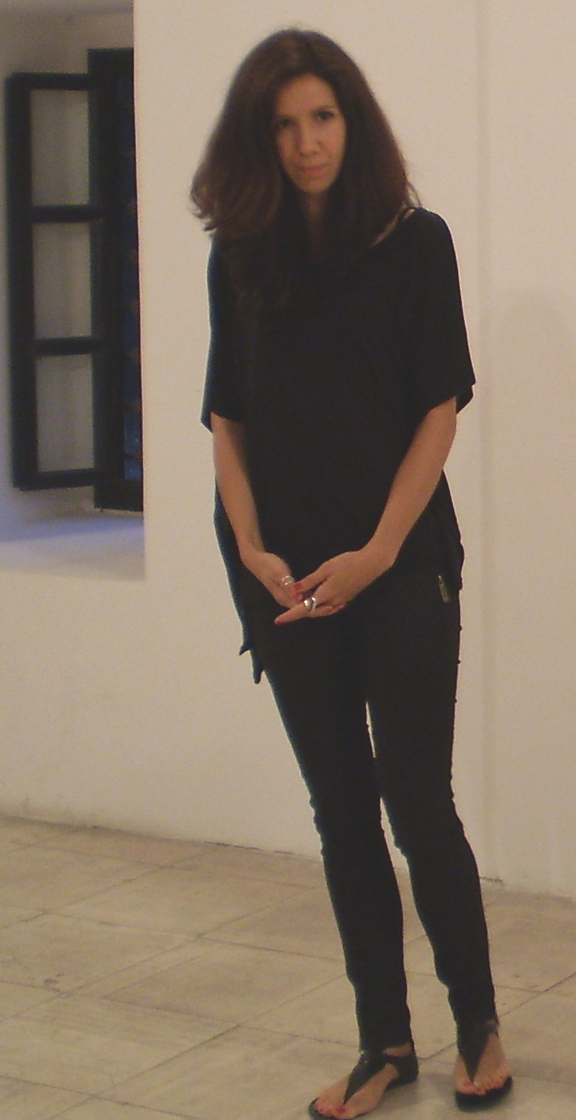 Srpski (latinica): Višnja Nikolić, Niš, jul 2013.